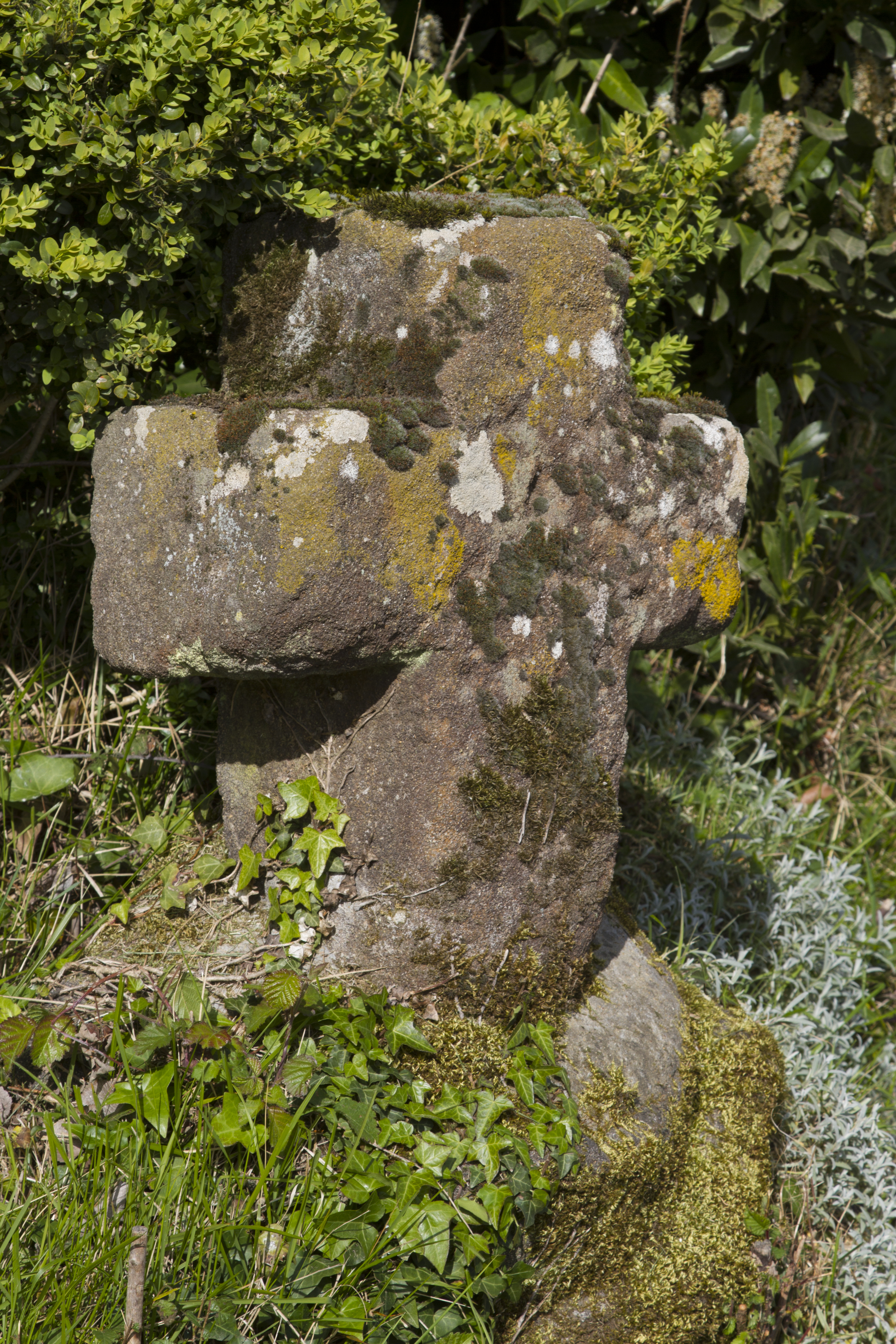 Etival - Croix en pierre de roussard